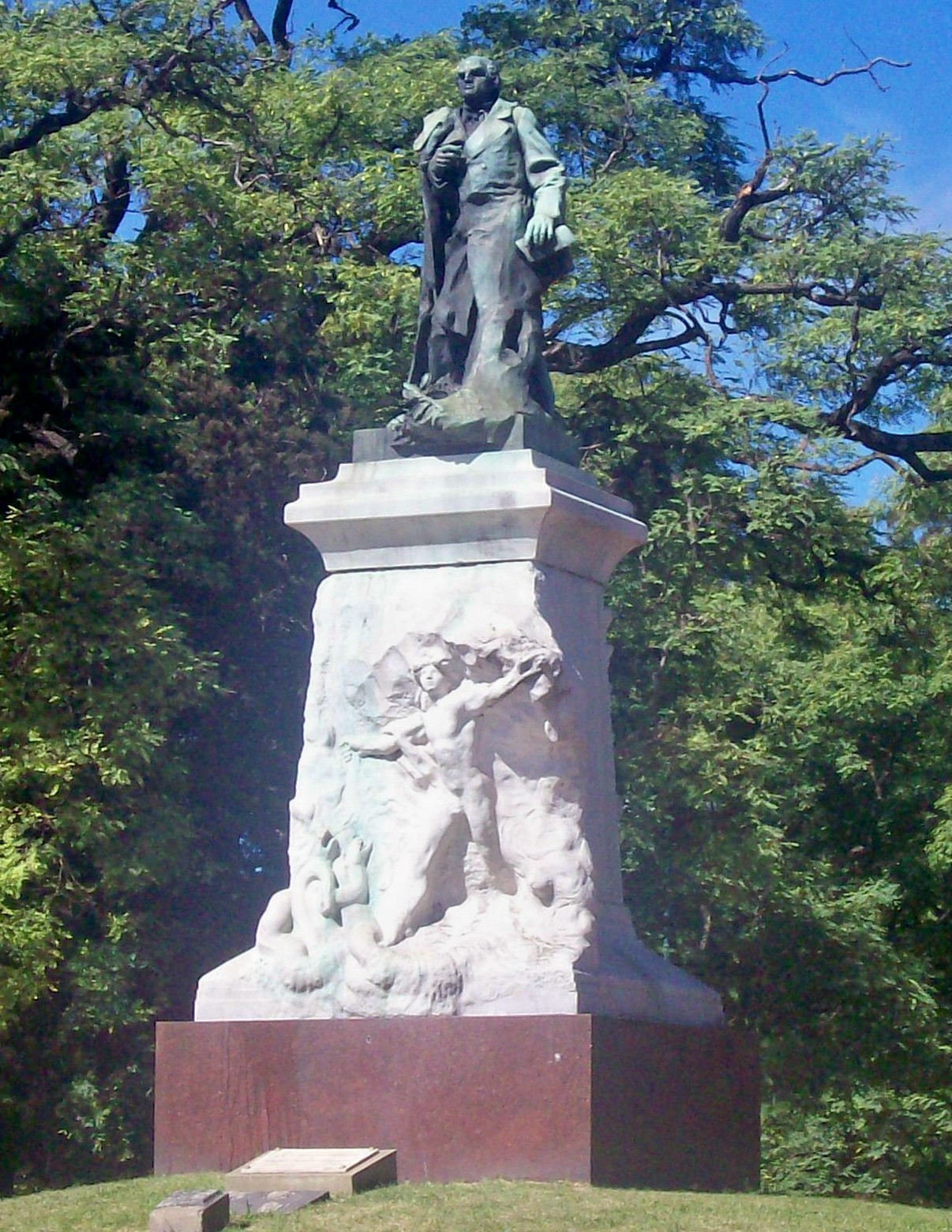 Monumento a Sarmiento en la Plaza Sicilia, Barrio de Palermo, Buenos Aires, Argentina